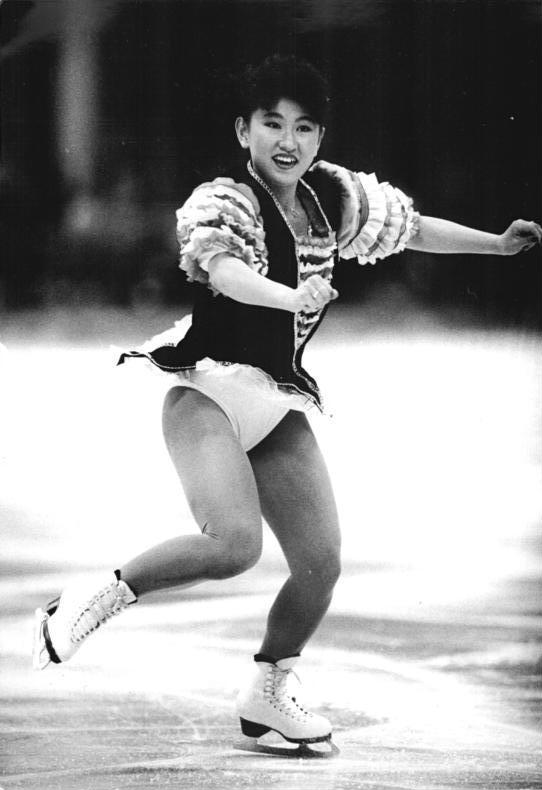 Midori Ito ADN-ZB Settnik 7.4.89 Berlin: ISU-Weltschaulaufen in der Werner-Seelenbinder-Halle (am 6.4.89)- Ein freudiges Wiedersehen gab es für die Berliner mit der 19jährigen Weltmeisterin Midori Ito (Japan), die schon im Vorjahr an gleicher Stelle zu den Lieblingen des Publikums gehörte.